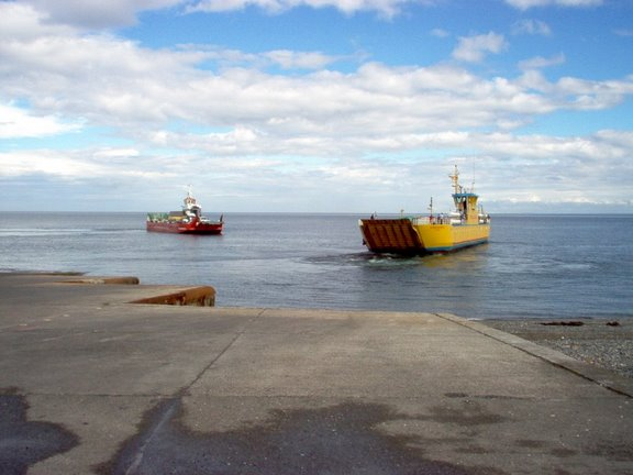 Barcazas en Chile